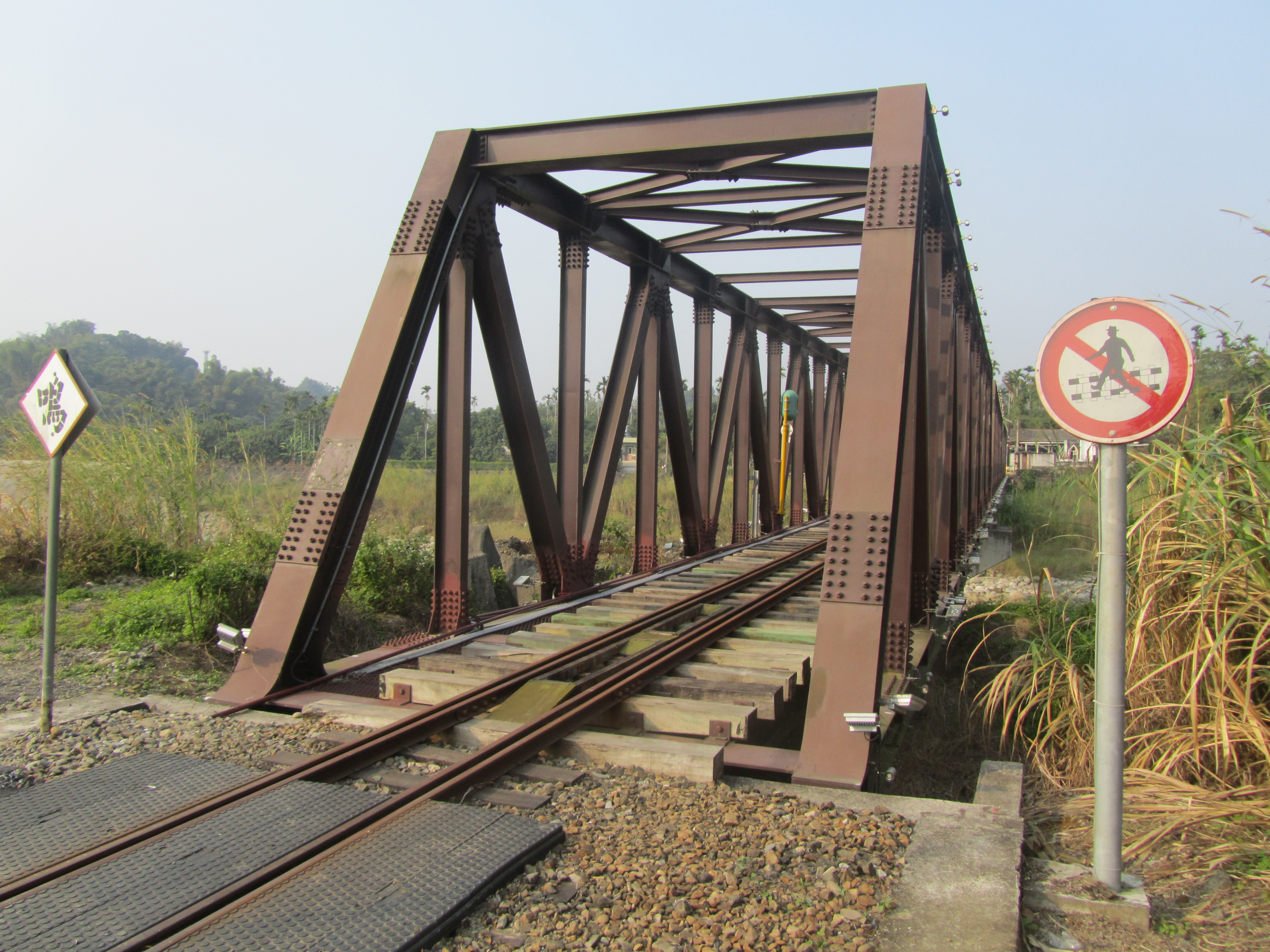 2013年1月19日，由東南向西北側看阿里山林鐵牛稠溪鐵橋南橋頭，前方為牛稠溪。